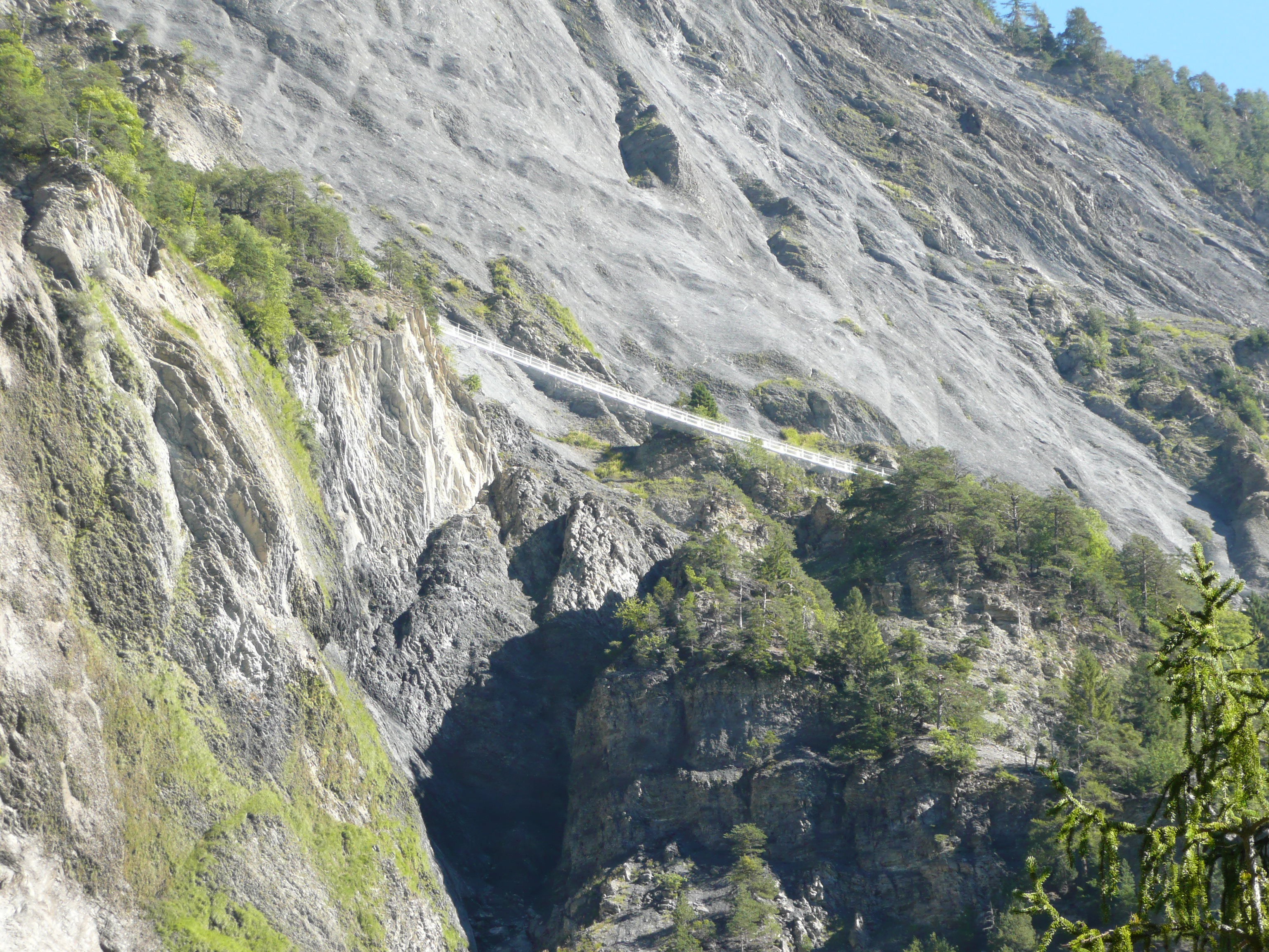 Hängebrücke im Verlauf des wanderweges entlang der Bisse de Savièse, gesehen von der Pont du Diable